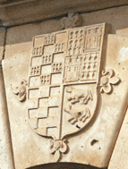 Fotografía del escudo de la clave del arco de la Casa del Cura, en Valdelaguna. Lleva las armas Quiñones, Vigil, Toledo y Daza.